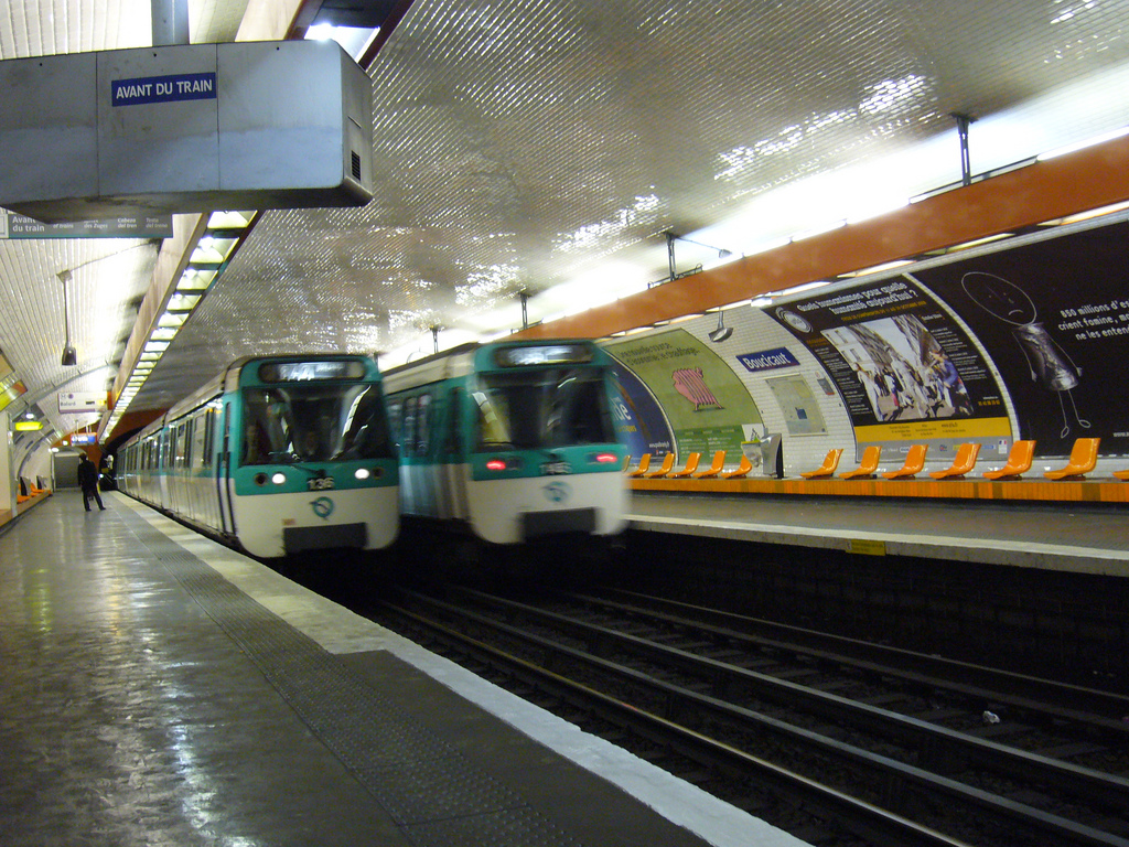 La station Boucicaut sur la ligne 8 du métro de Paris.